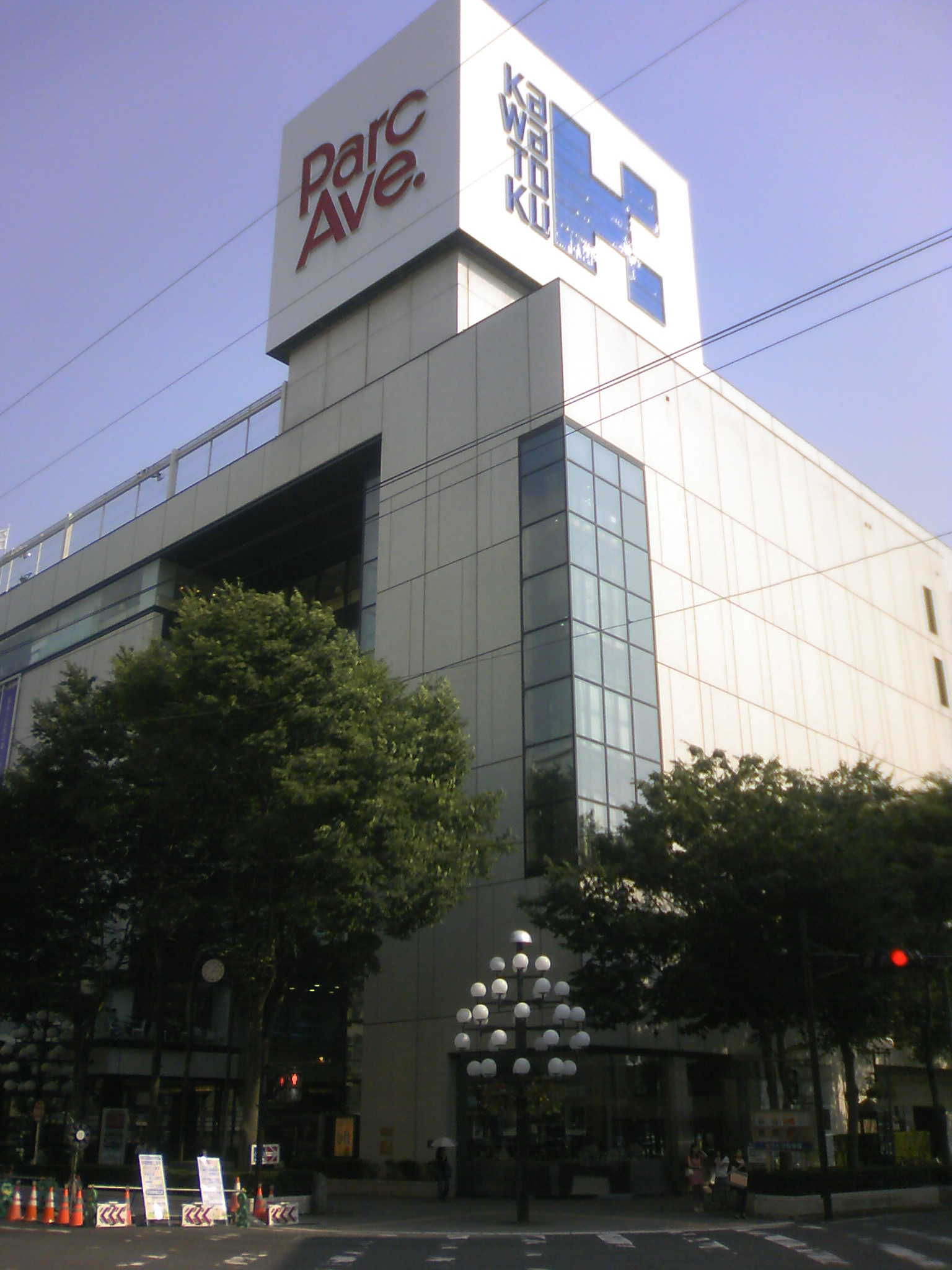 岩手県盛岡市の百貨店「川徳」